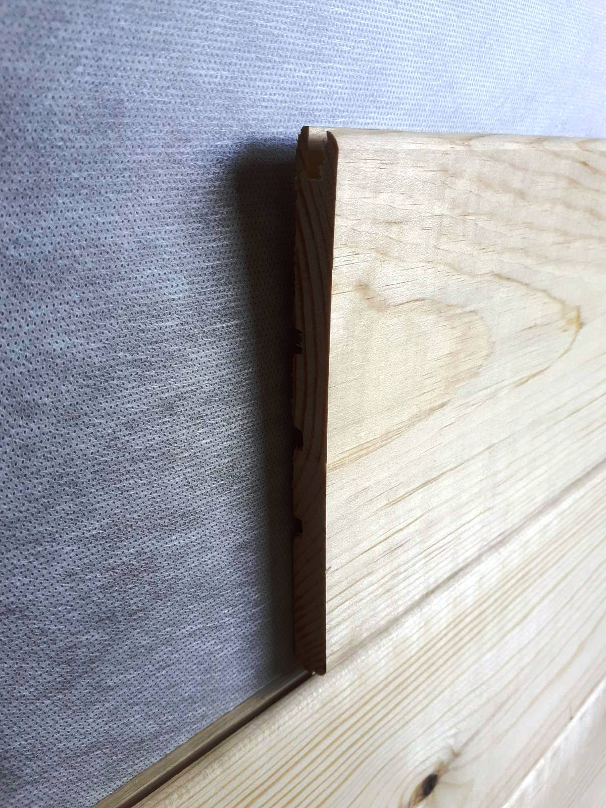 Thorn (top) and groove (bottom) of wall panel